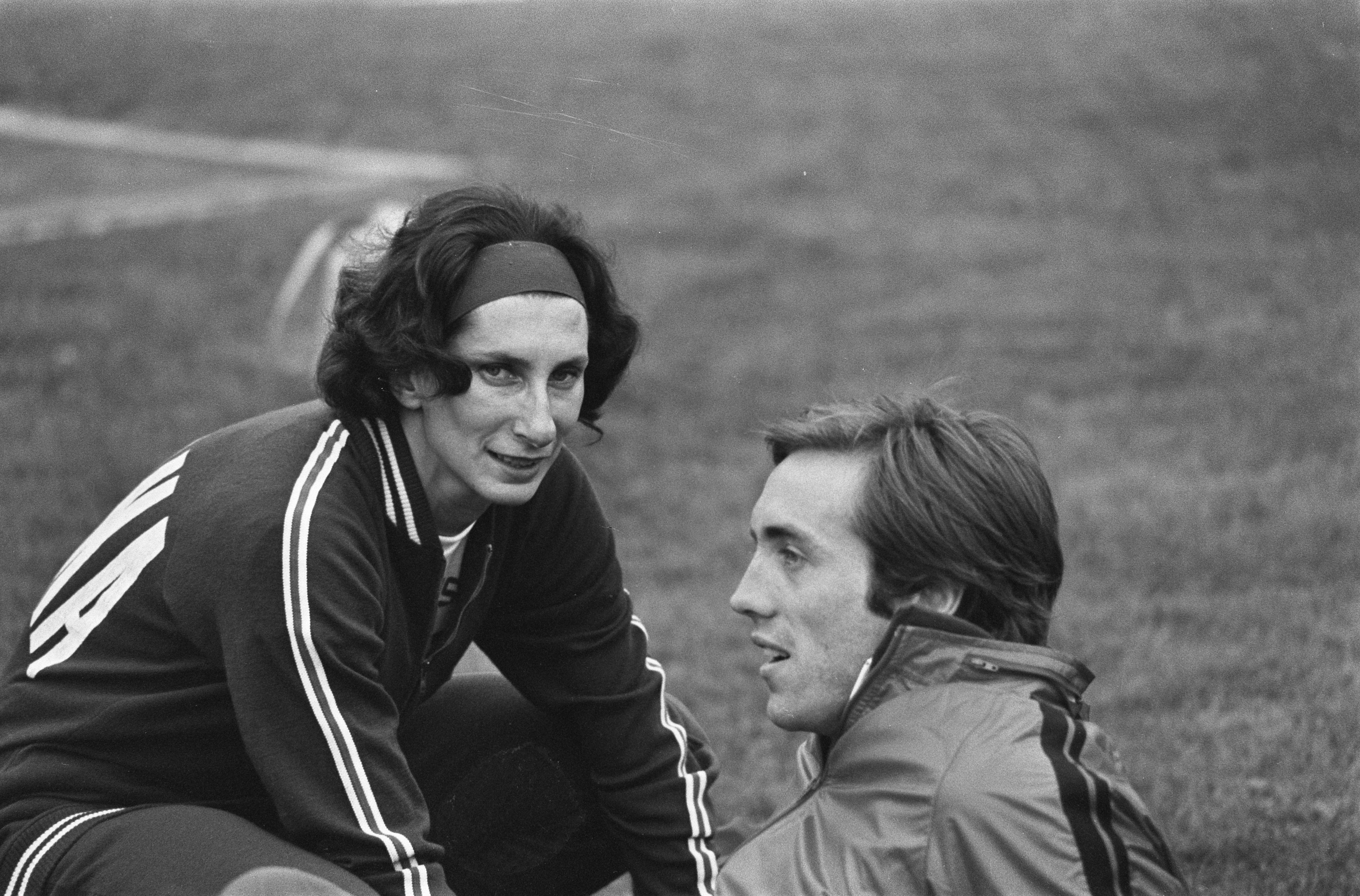 Collectie / Archief : Fotocollectie Anefo Reportage / Serie : Internationale atletiekwedstrijden op Papendal in 1975 Beschrijving : Poolse wereldrecordhoudster Irena Szewinska met landgenoot Buciarski Datum : 16 juli 1975 Locatie : Arnhem, Gelderland Trefwoorden : atletiek, sport, toernooien Persoonsnaam : Buciarski, Wojciech Jan, Szewiñska, Irena Instellingsnaam : Papendal Fotograaf : Fotograaf Onbekend / Anefo Auteursrechthebbende : Nationaal Archief Materiaalsoort : Negatief (zwart/wit) Nummer archiefinventaris : bekijk toegang 2.24.01.05 Bestanddeelnummer : 928-0515